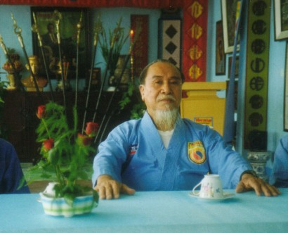 Foto del Gran Maestro Le Sang - Vovinam Viet Vo Dao